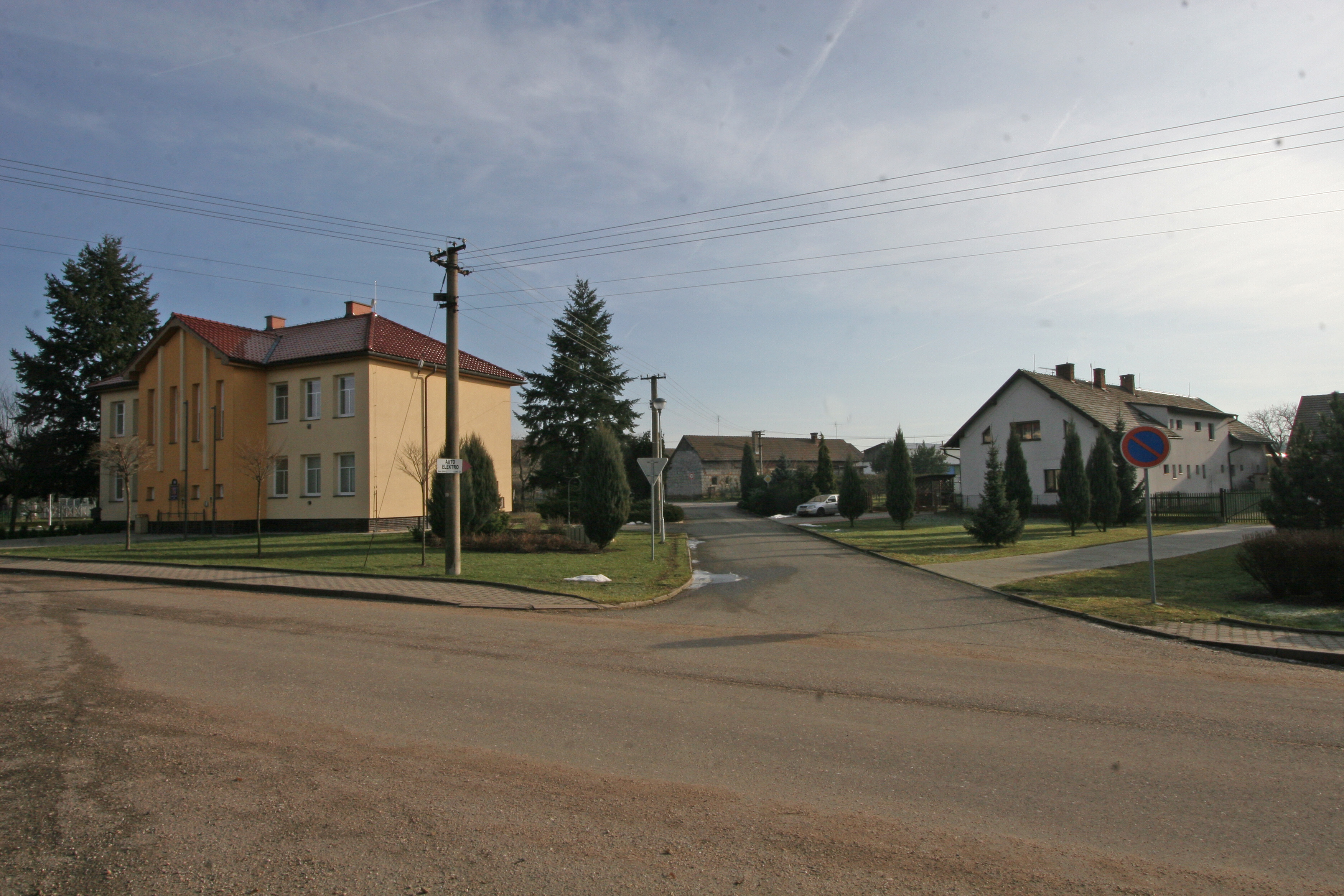 Lodín obecní úřad